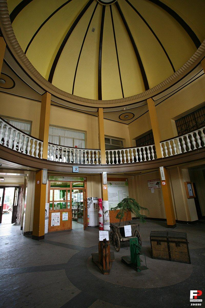 Wnętrze holu głównego, z pięterkiem, nakryte kopułą. Wiem, że krzywe, ale w pośpiechu. Szkoda mi prostować, bo stracę szczegóły wnętrza. Okazja do odwetu ocenowego - podkładam głowę:)